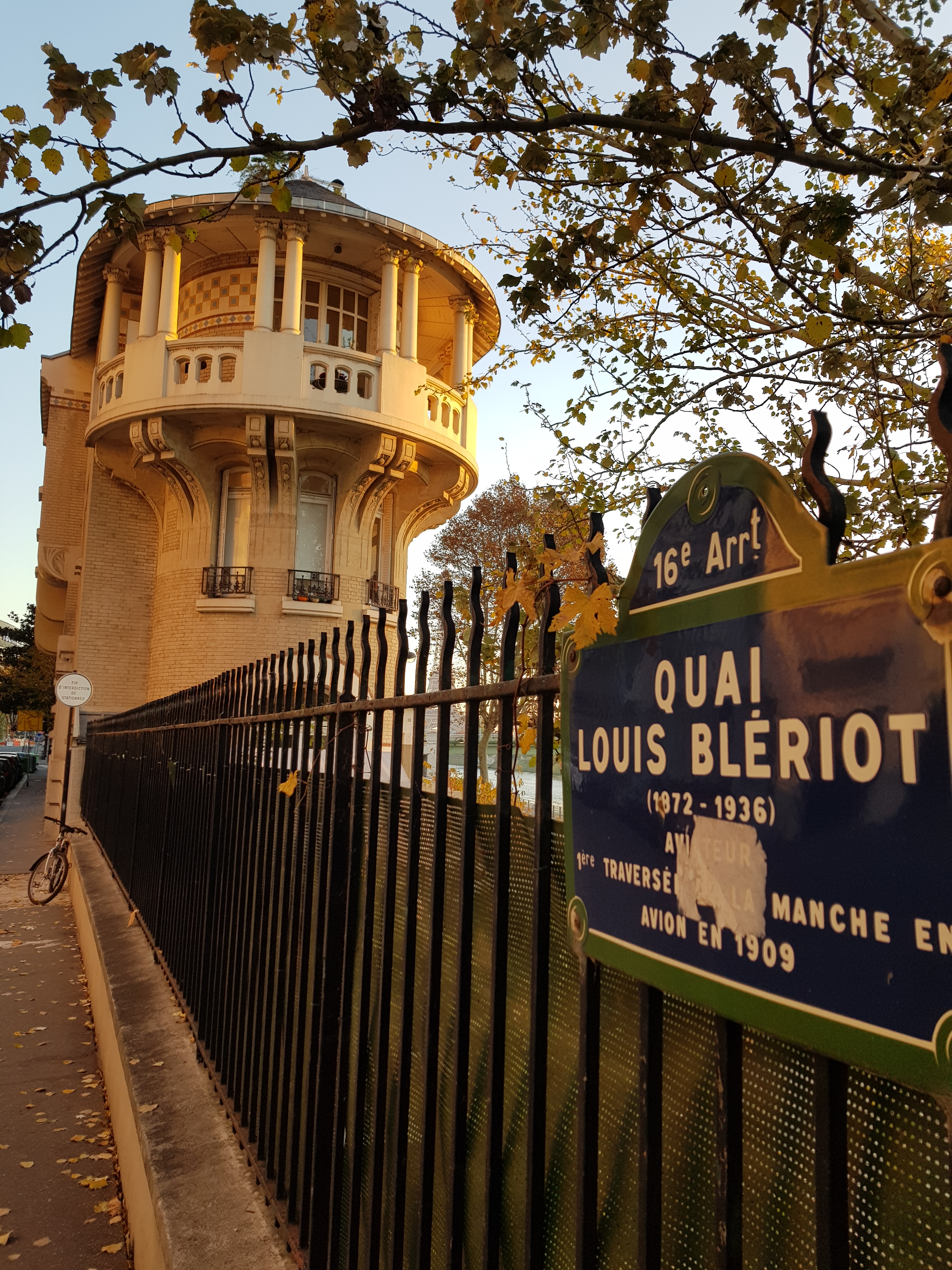 N° 17-21, quai Louis-Blériot, Paris 16e.